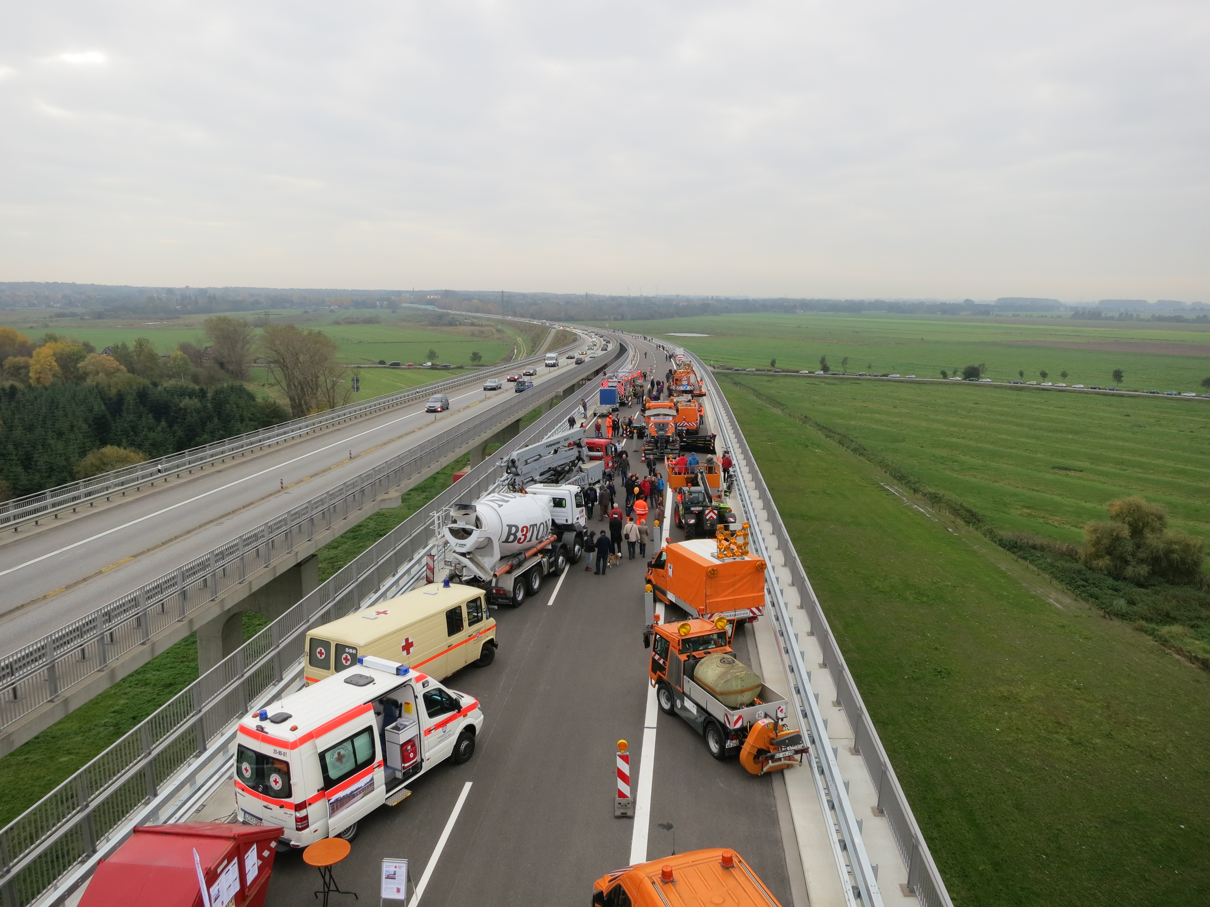 Eröffnung der westlichen Störbrücke der A23 bei Itzehoe